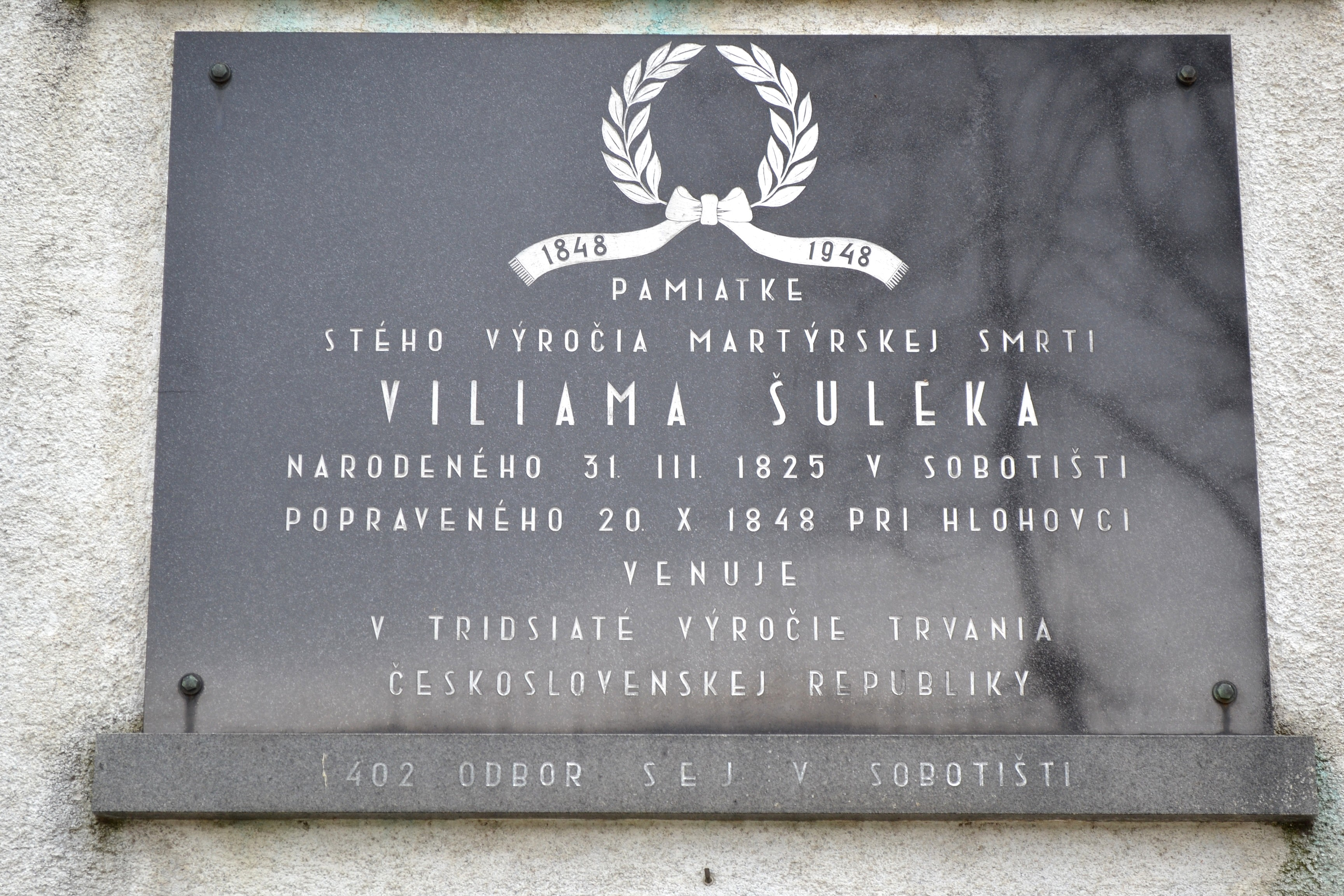 Sobotište (okr. Senica), pamätná tabuľa verejnému činiteľovi Viliamovi Šulekovi (1825 - 1848)